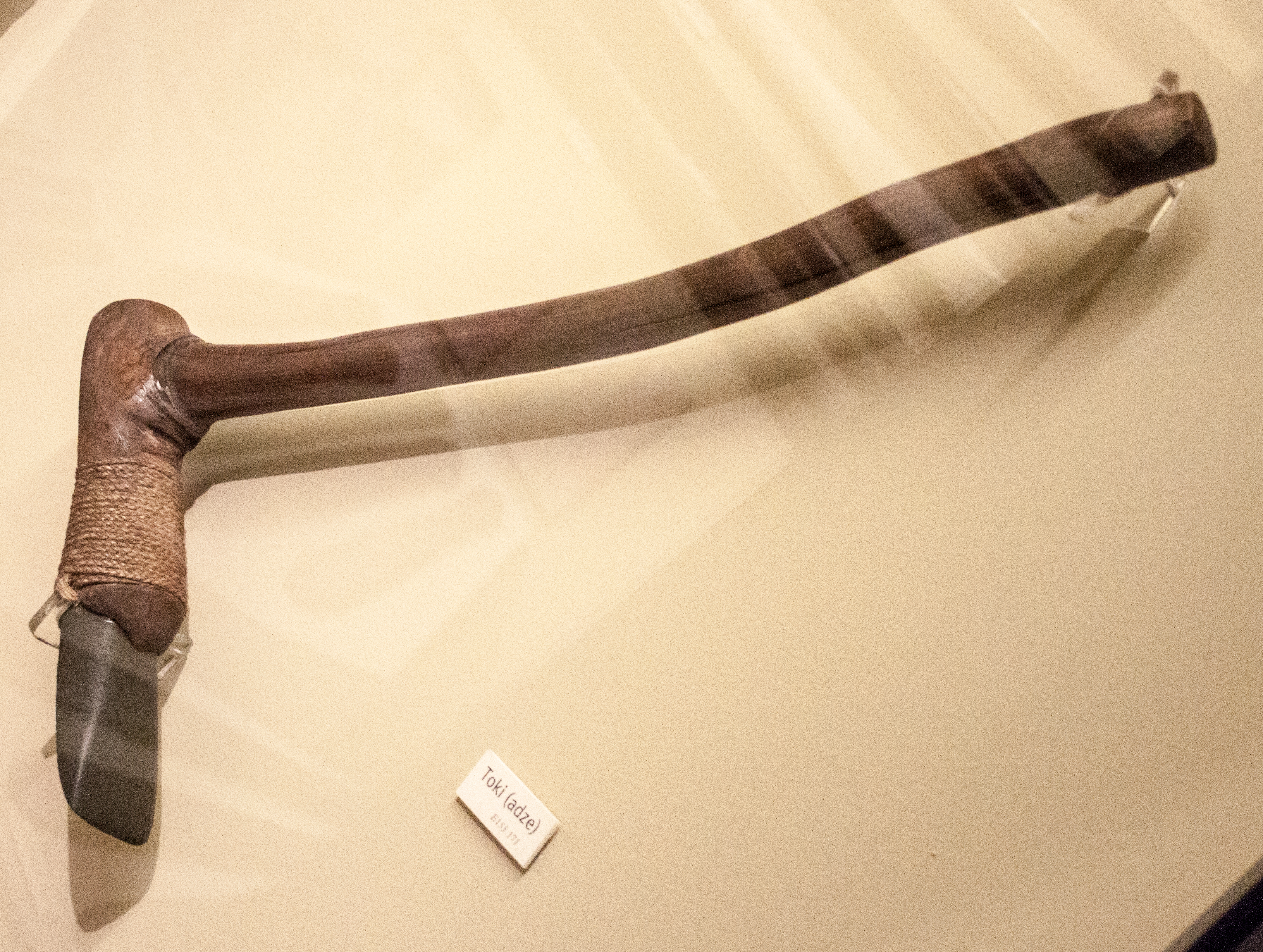 Toki (adze)